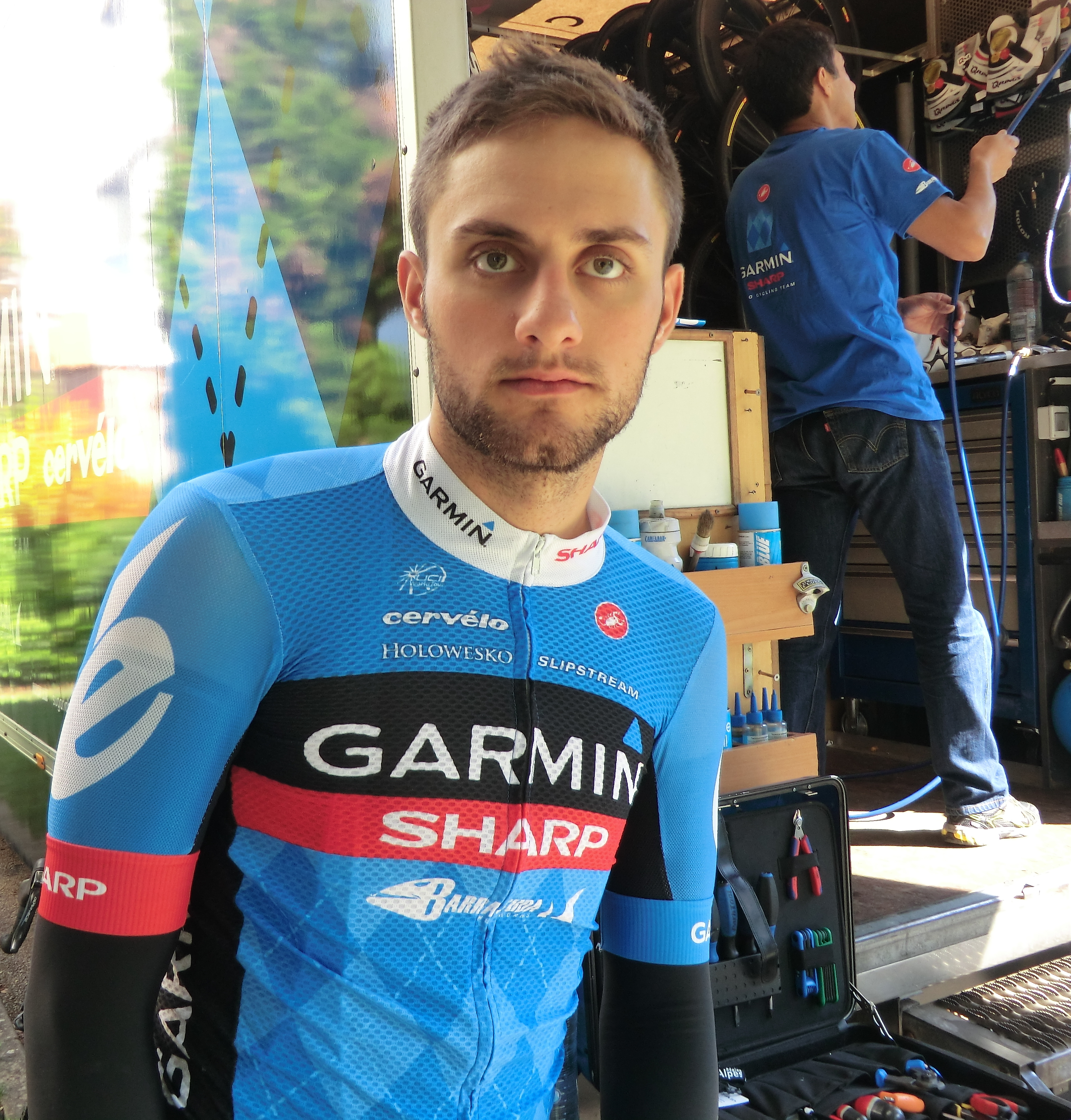 Coureurs à l'échauffement au matin du prologue du tour de l'Ain 2013, à l'hôtel Lyon-Est à Saint-Maurice-de-Beynost.